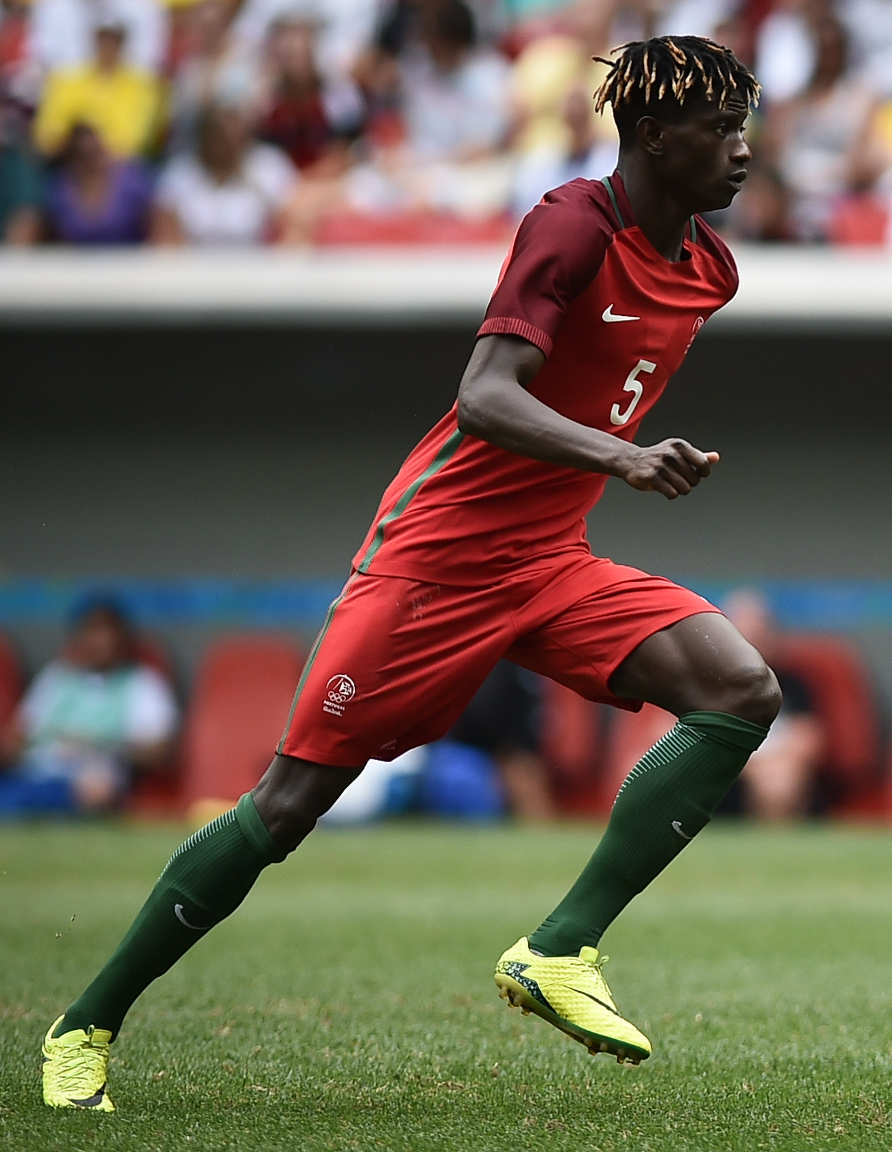 Estádio Nacional de Brasília Mané Garrincha, Brasília, DF, Brasil, 13/8/2016 Foto: Andre Borges/Agência Brasília Portigal e Alemanha jogam neste sábado (12), no Estádio Mané Garrincha, pelas quartas de final do futebol masculino nas Olimpíadas 2016.